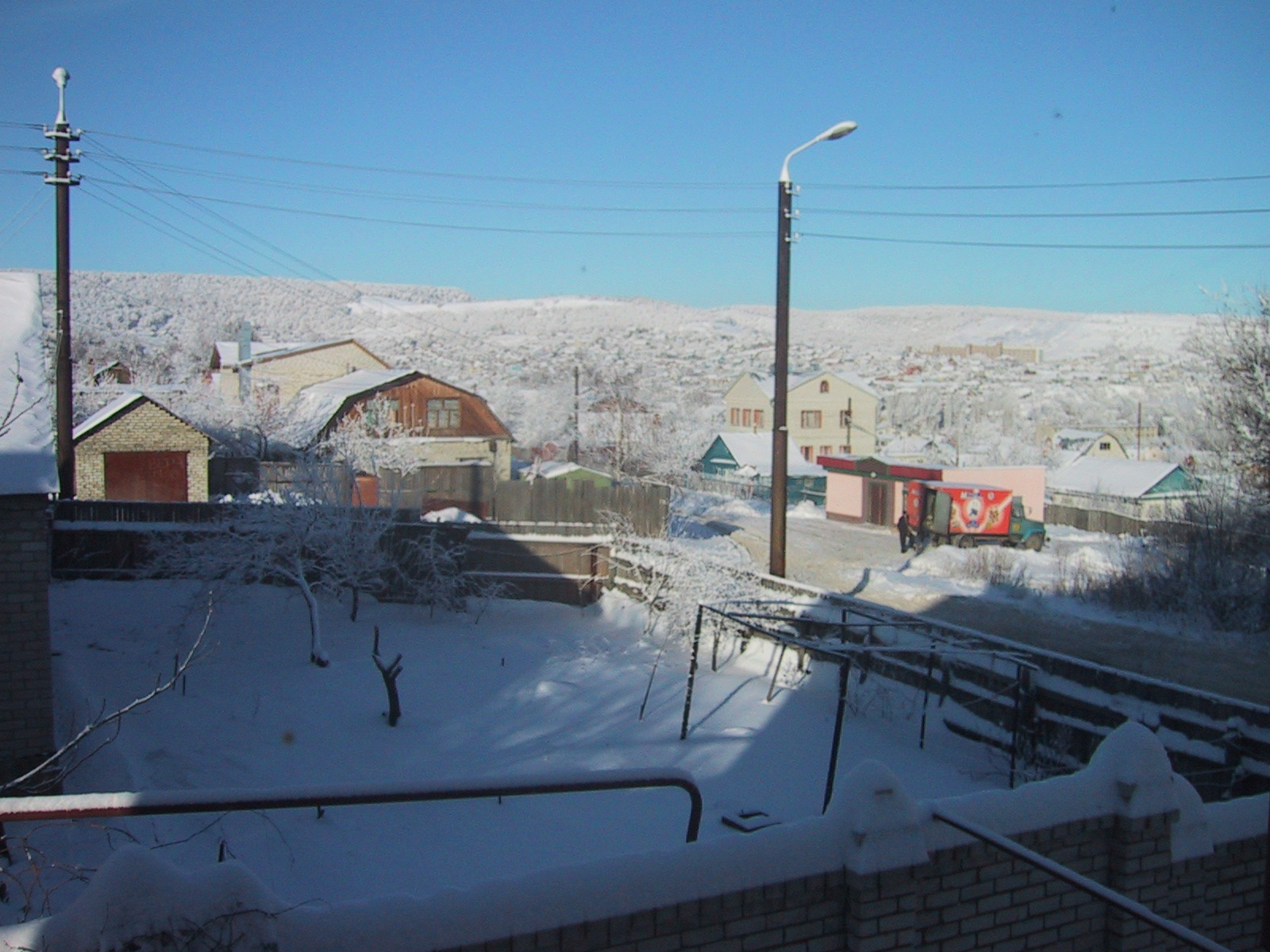 Зима в Агафоновке